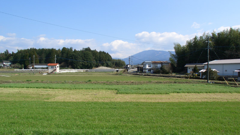 くま川鉄道湯前線ja:木上駅 駅周辺 ホーム上から南側を見る。 丘の向こうがja:国道219号。 撮影者/著者/著作権保有者 : MK Products (本人がアップロード) 撮影日 : 2007/03/14 木上駅用にアップロードした画像です。良い画像があれば別の画像に変えてください。